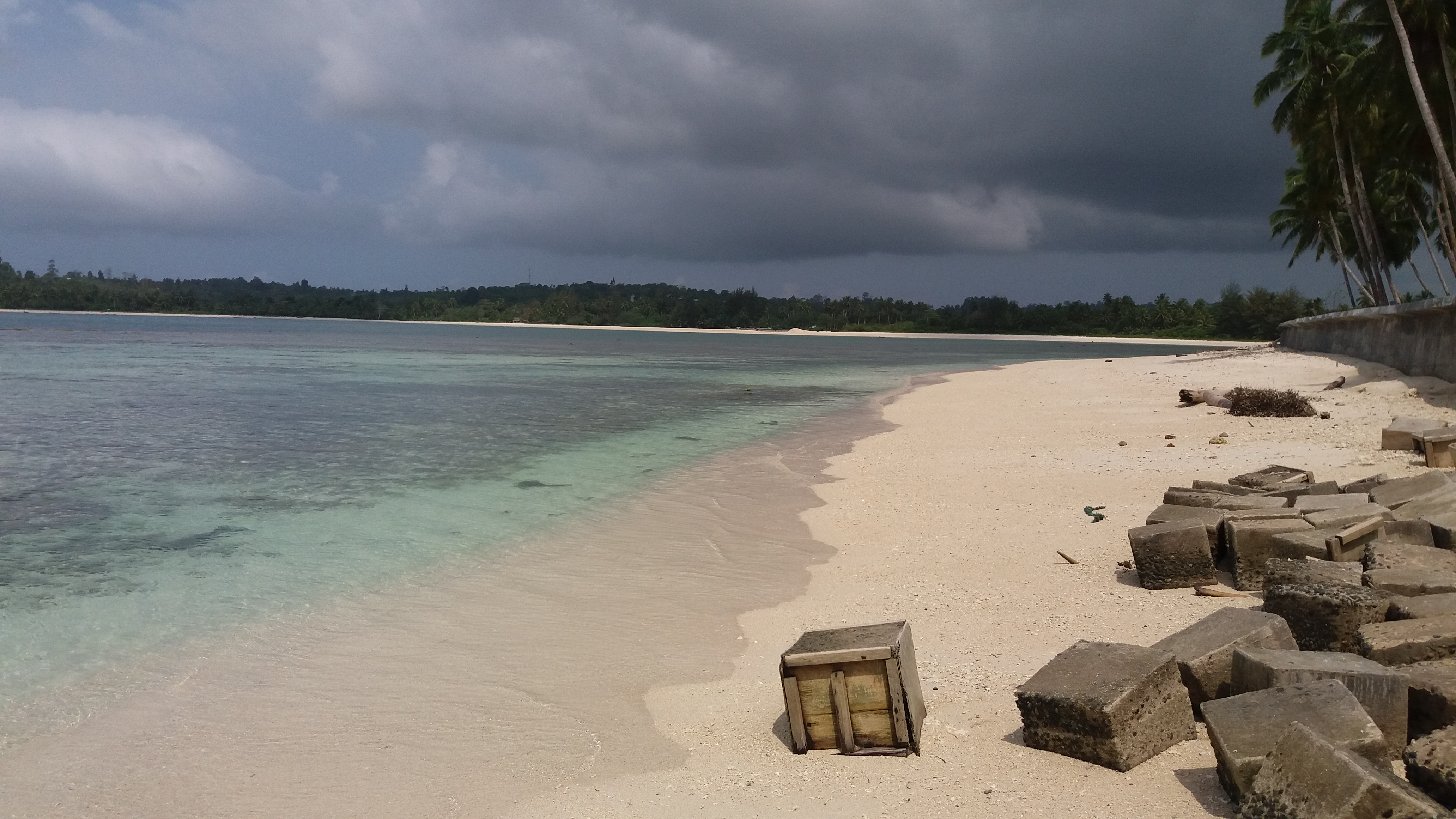 Pantai Jati, Tuapejat